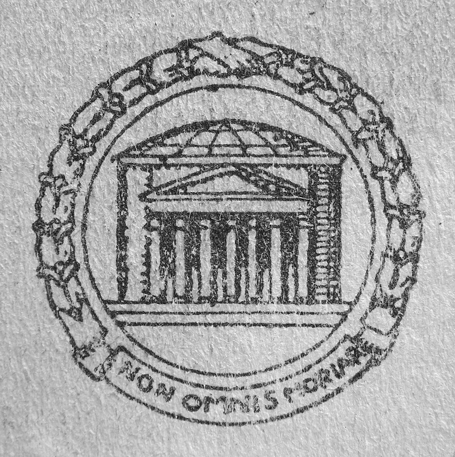 Pantheon Irodalmi Intézet emblémája